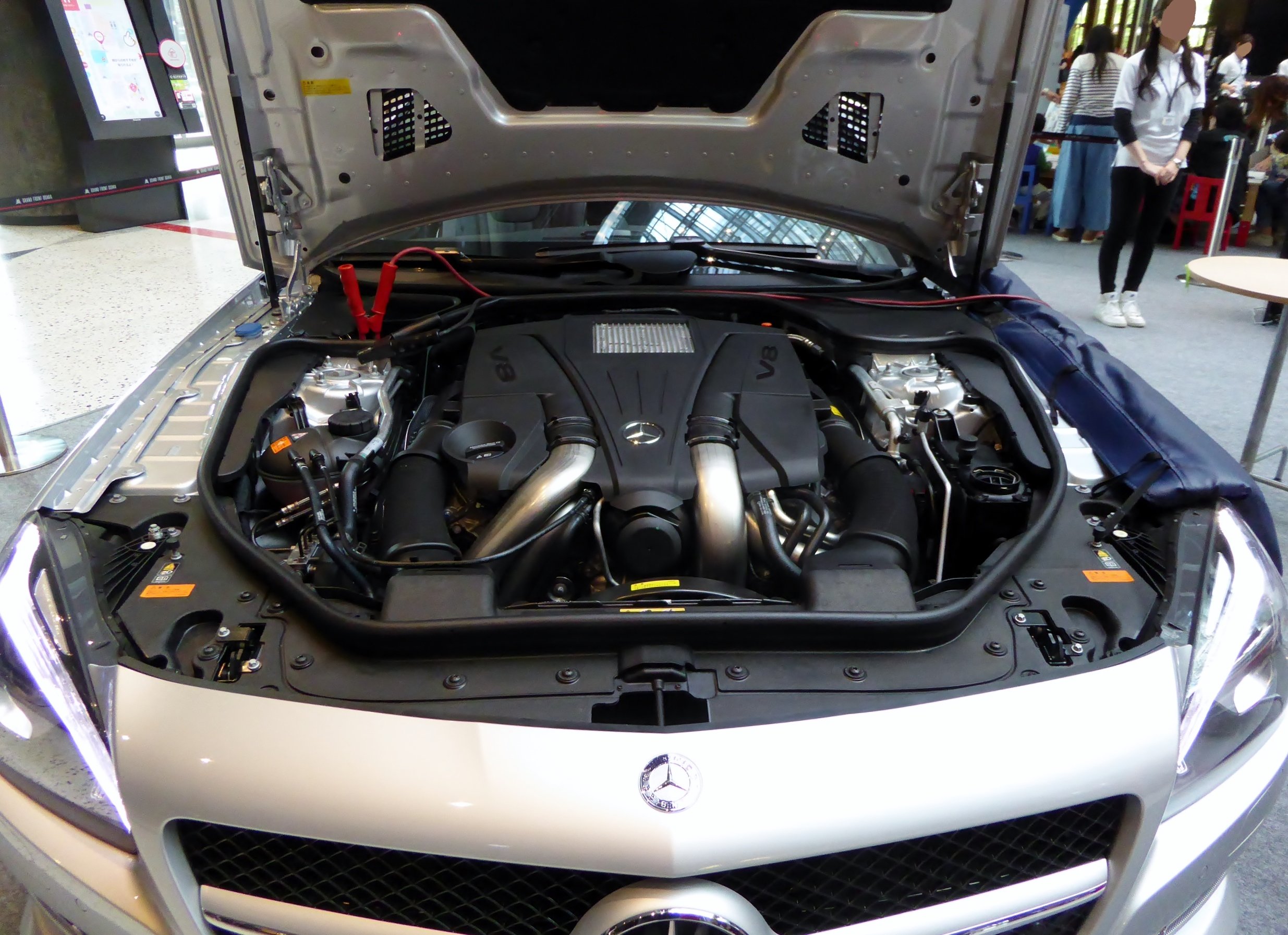 R231型メルセデス・ベンツSL550のエンジンルームを撮影。